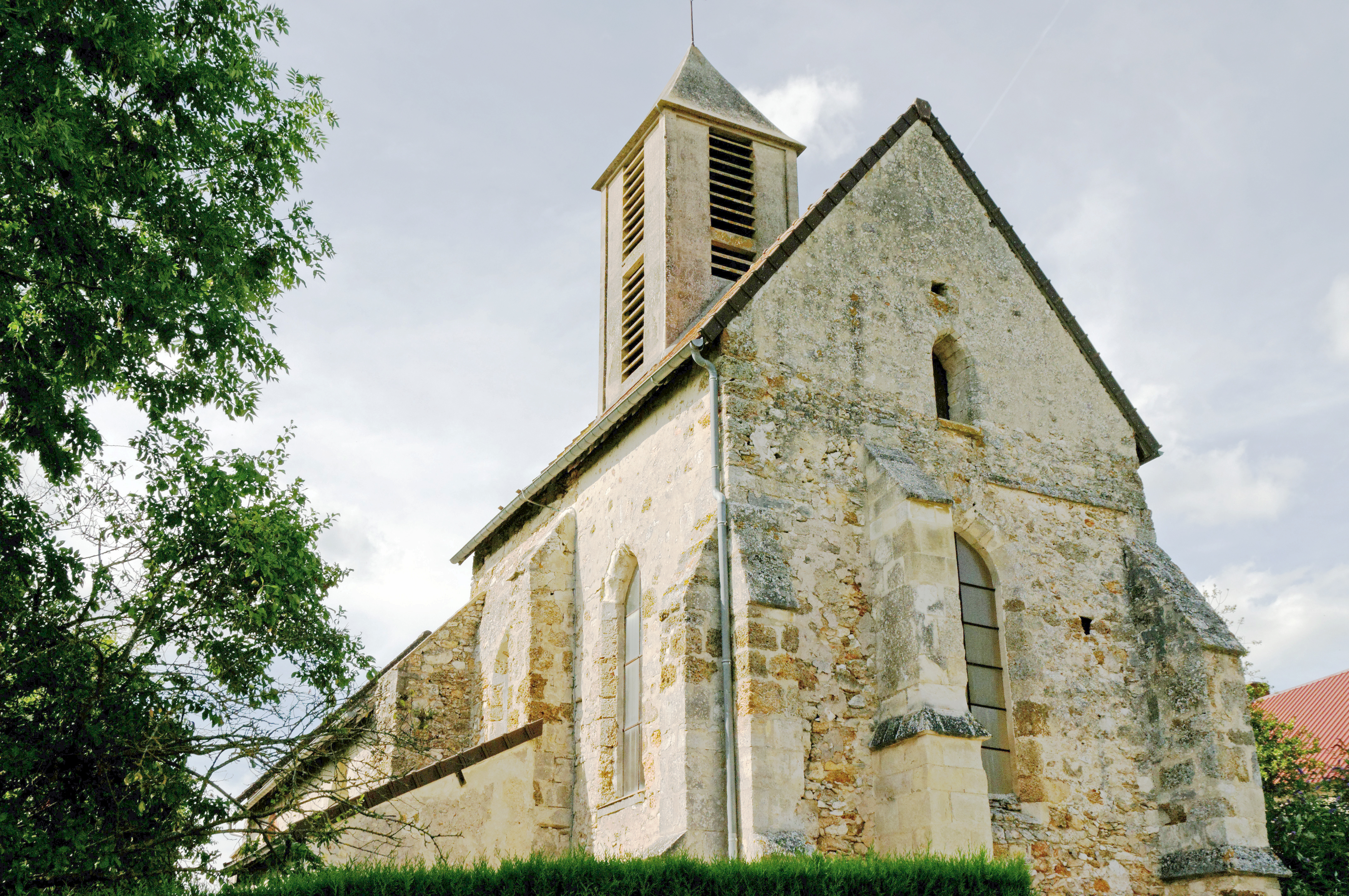 Cette église renferme une stalle en bois de trois places du 15ème siècle elle est classée au tite "objets".